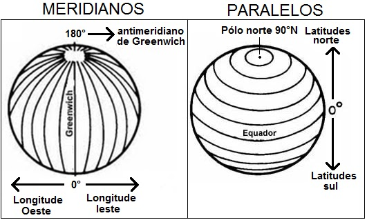 Cartografia